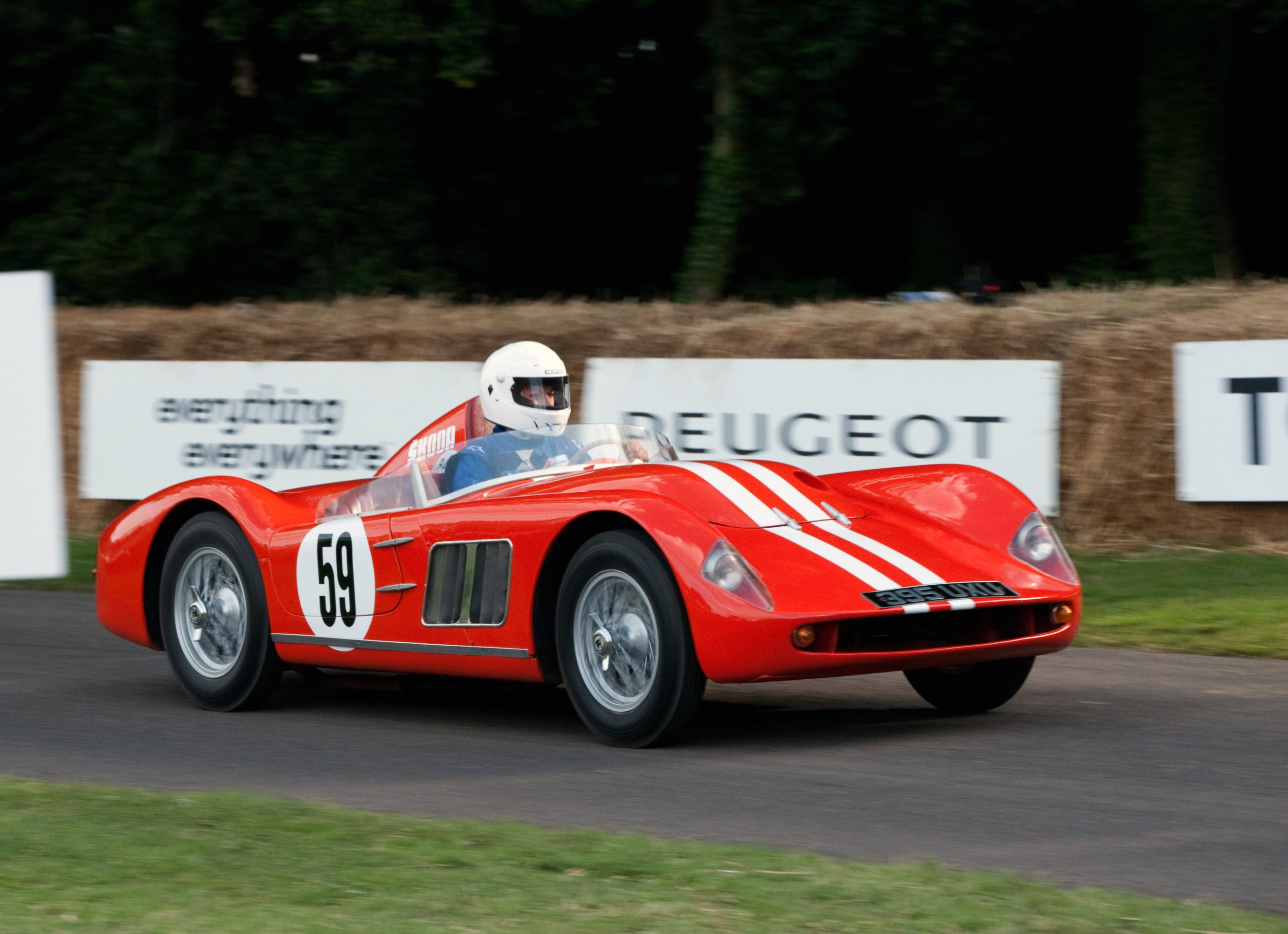 Škoda 1100 OHC Spider at Goodwood Hill